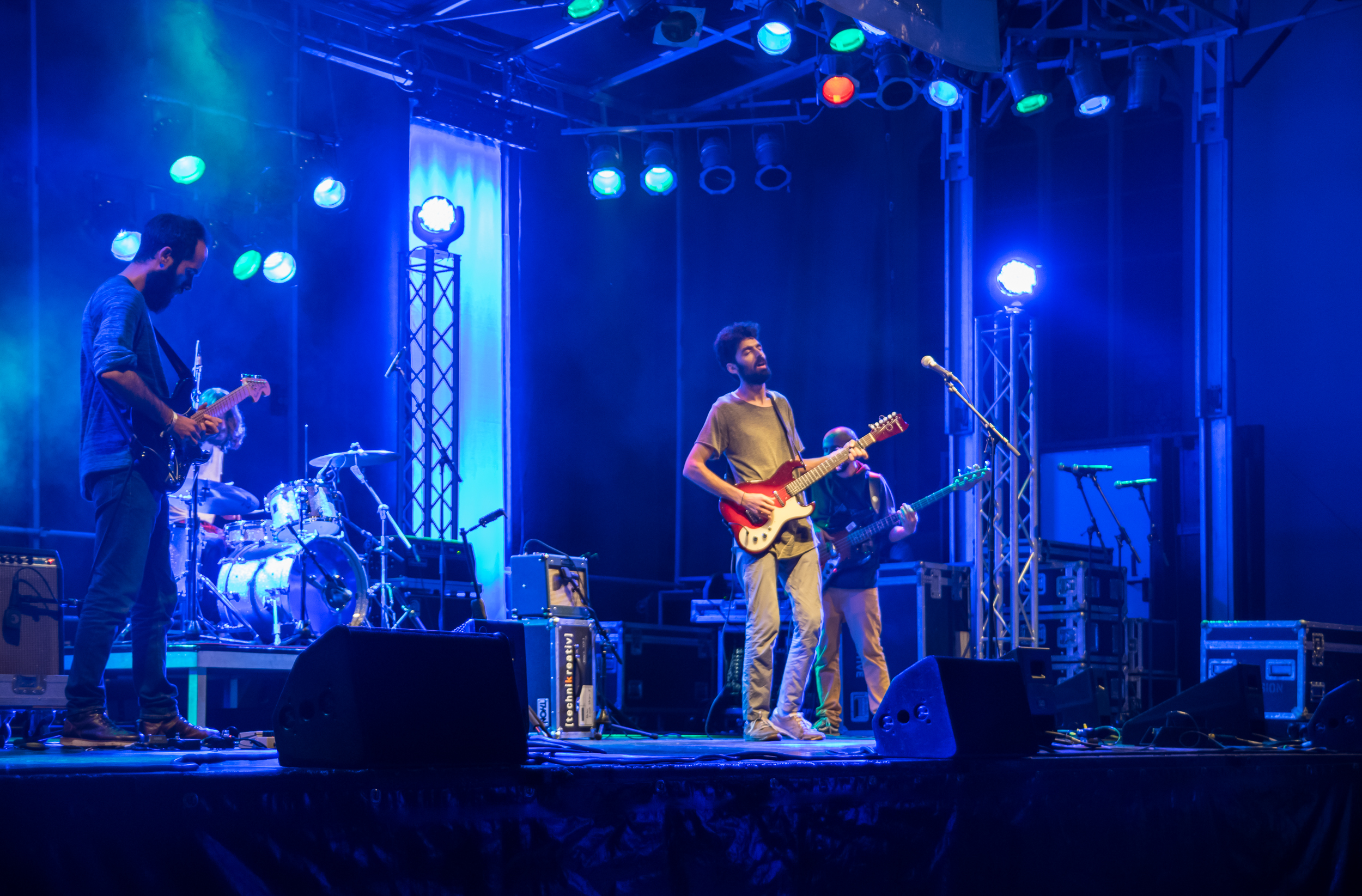 Die syrische Band Khebez Dawle auf der Detmolder Sommerbühne 2016